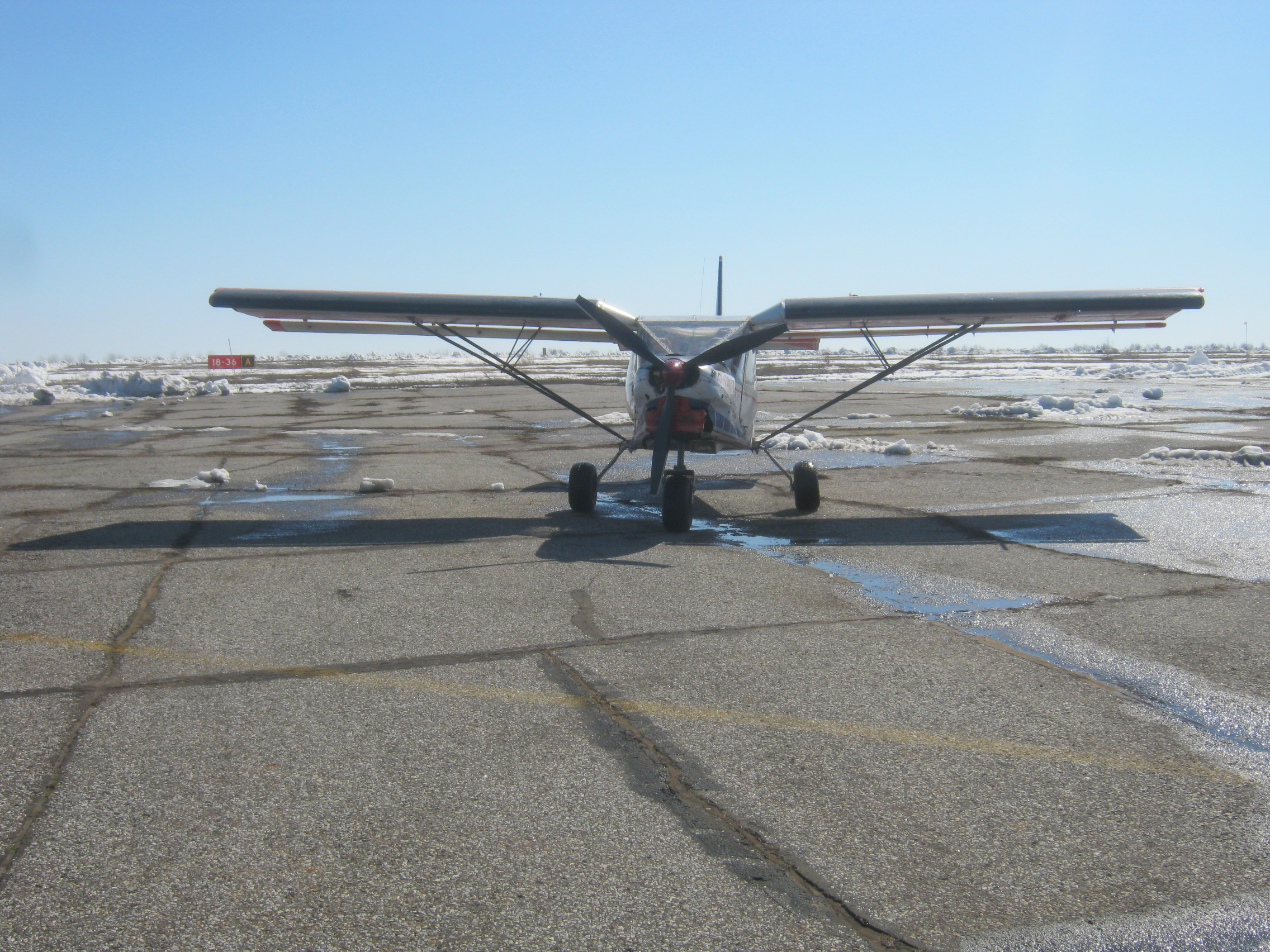 Самолет в аэропорту Нефтекамска, вероятно ХАЗ - 30 украинского производства.